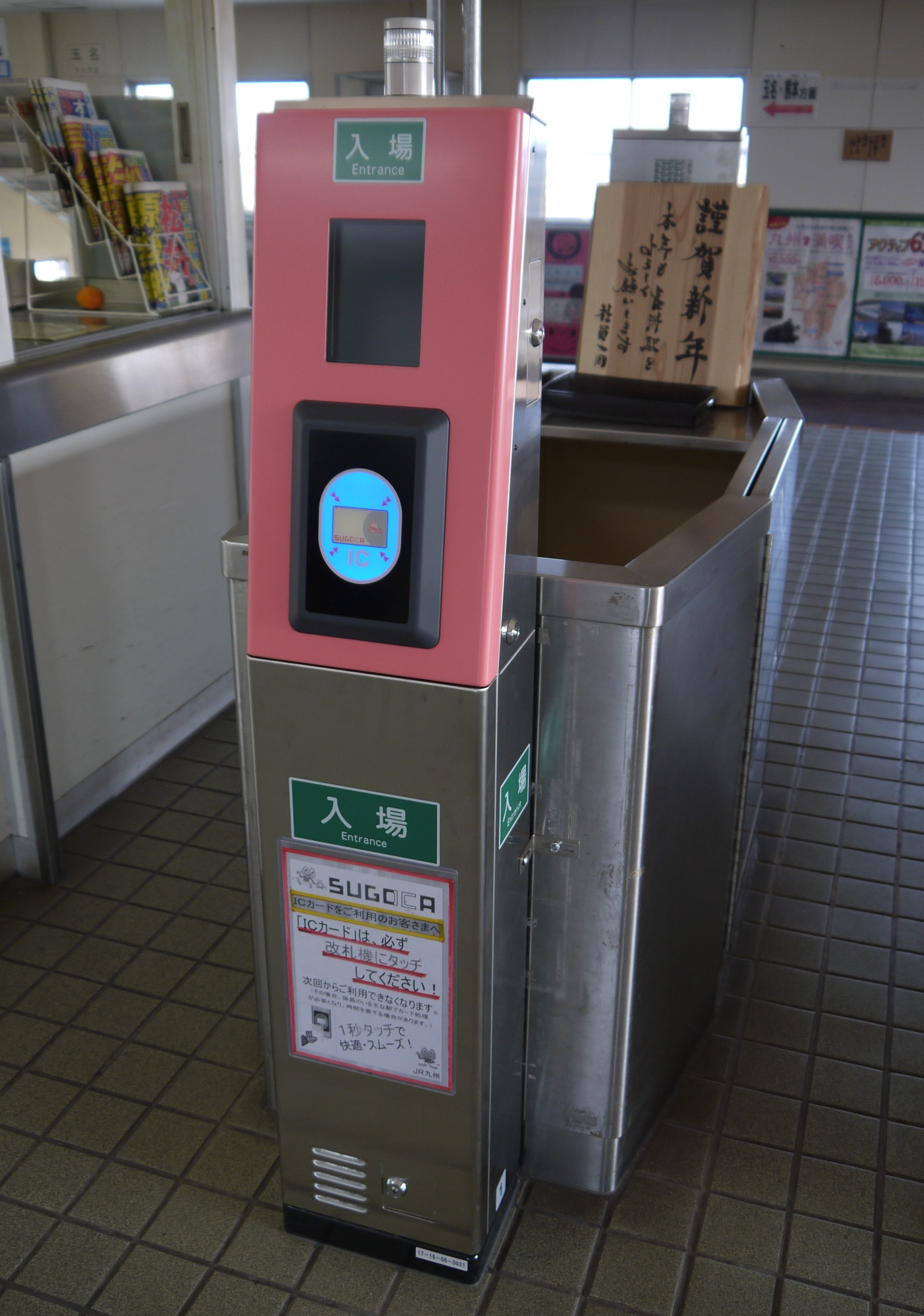 長洲駅改札のSUGOCA簡易カードリーダー。